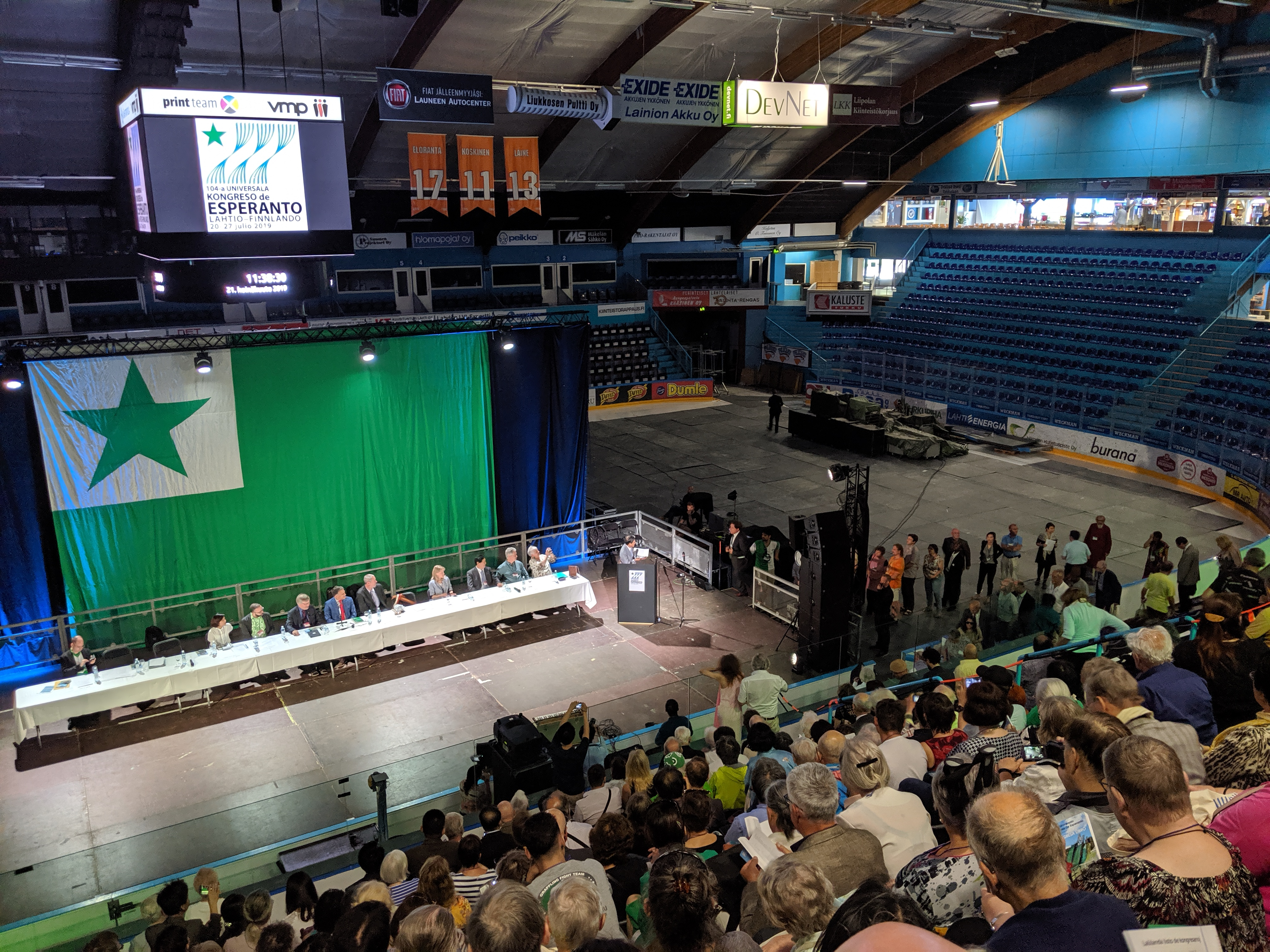 Landaj salutoj dum UK 2019